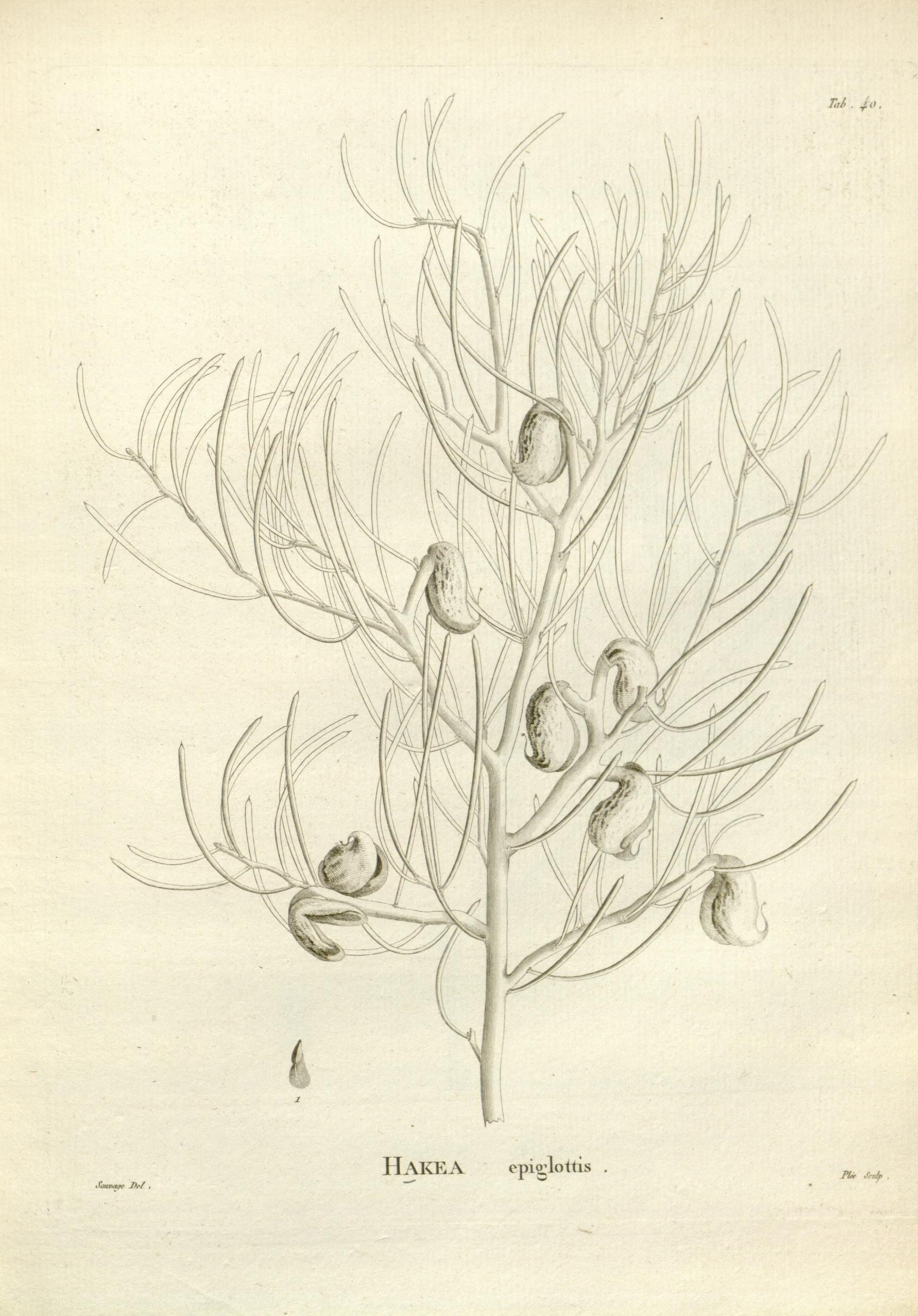 mdfi . \ HAKEA epi^lotti